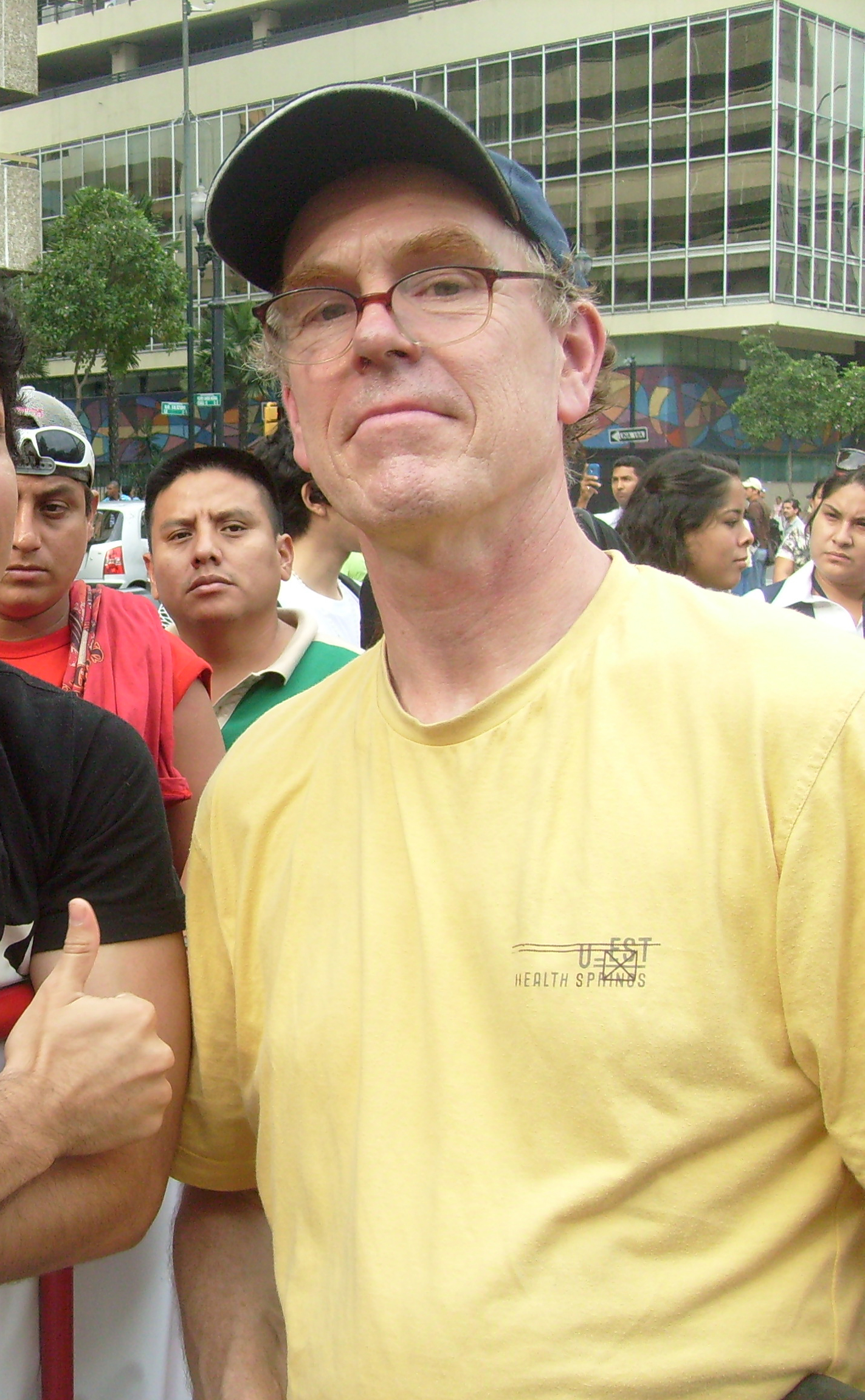 El artista británico Julian Beever durante su estadía en Guayaquil, Ecuador en Julio de 2011, por la celebración de las fiestas julianas.